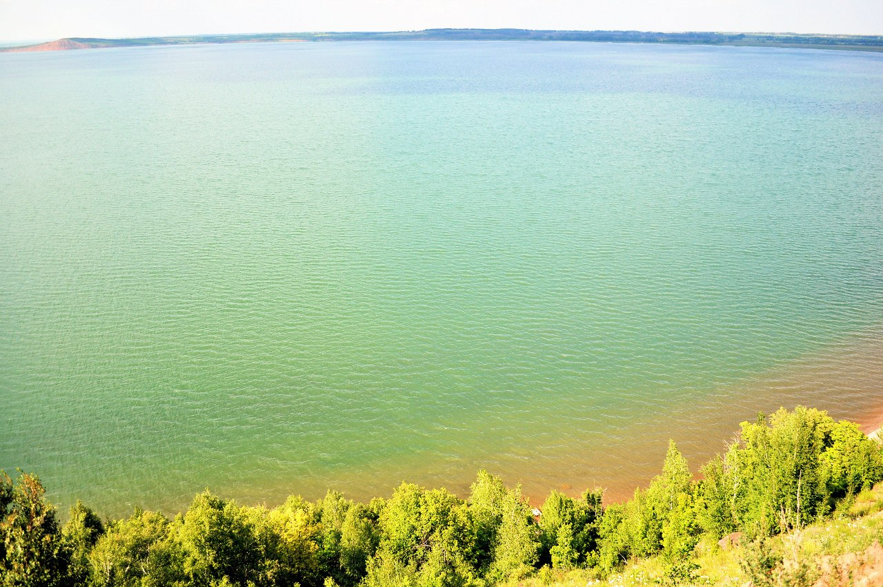 Аслы-Куль, Давлекановский район This image is related to the protected area of Russia number 0210115